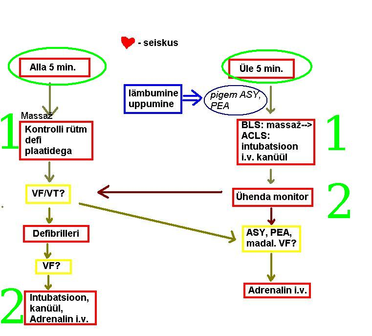 Elustamise ACLS skeem